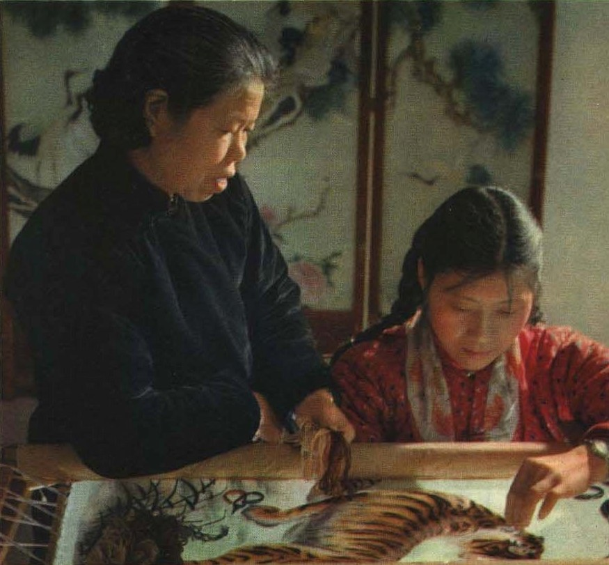 1963-07 1963年 湘绣制作